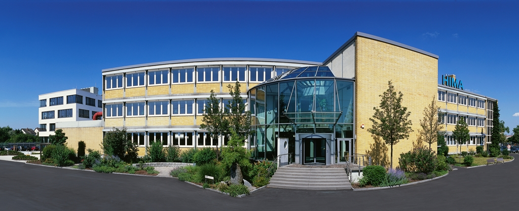 HIMA Haupsitz in Brühl bei Mannheim